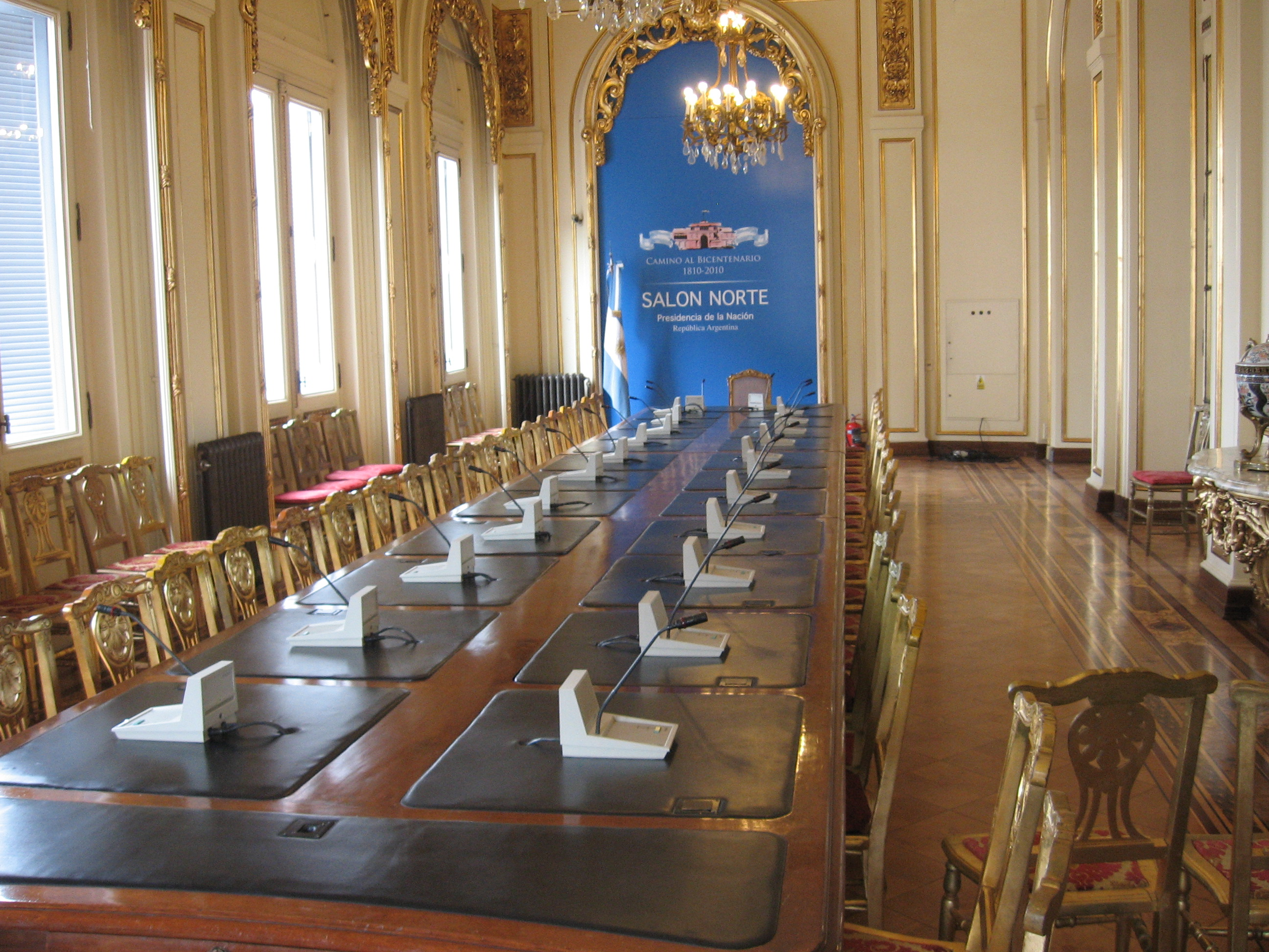 Salón Norte, Casa Rosada